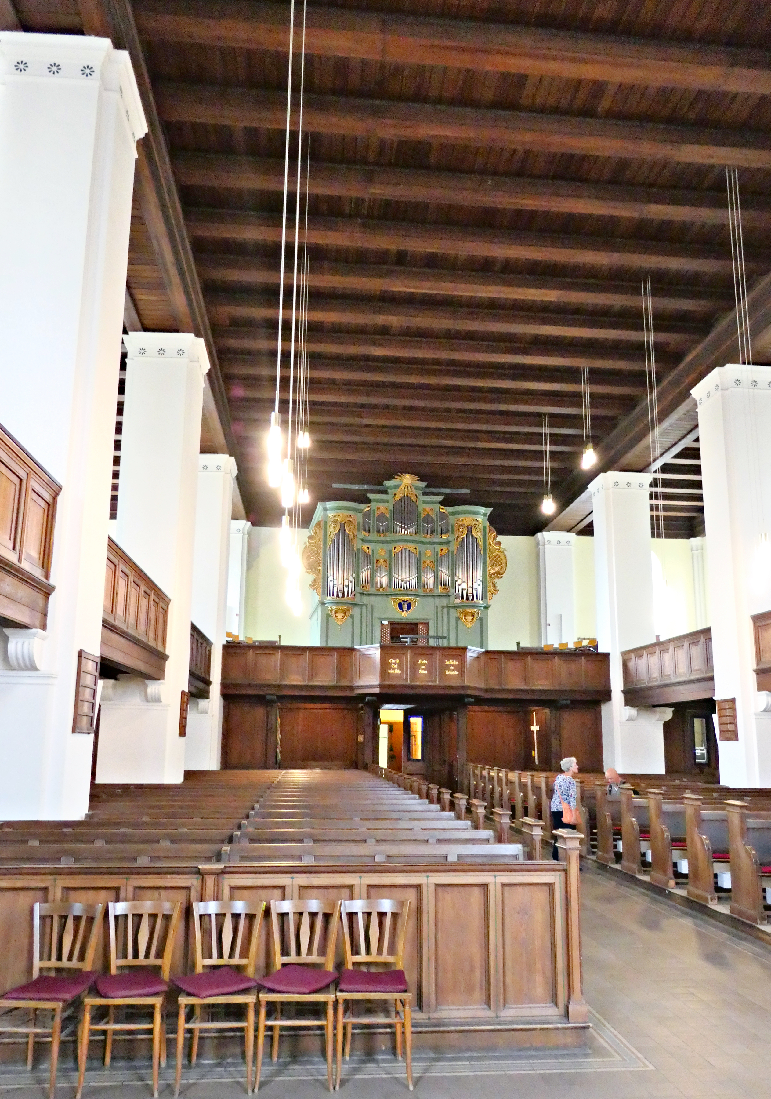 Orgel in Maria-Magdalenen-Kirche Templin, Landkreis Uckermark, Brandenburg, Deutschland